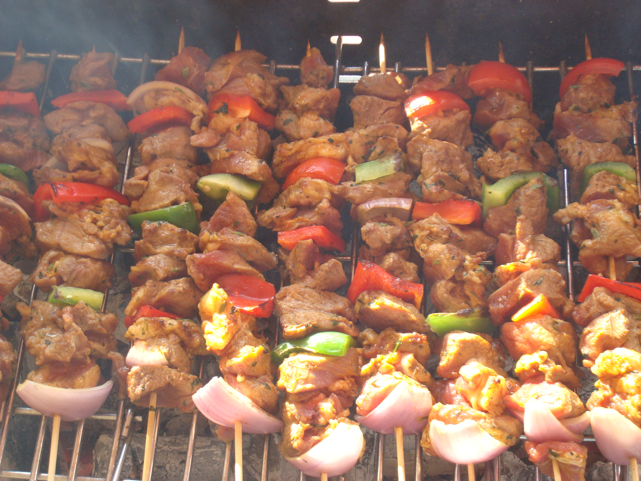 Carn de xai per a l'aid al adha